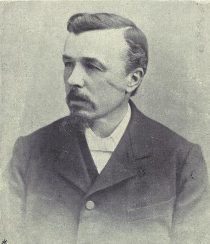 Pregethwr, bardd, nofelydd, emynydd ac ysgolfeistr Watcyn Wyn (1844 - 1905)